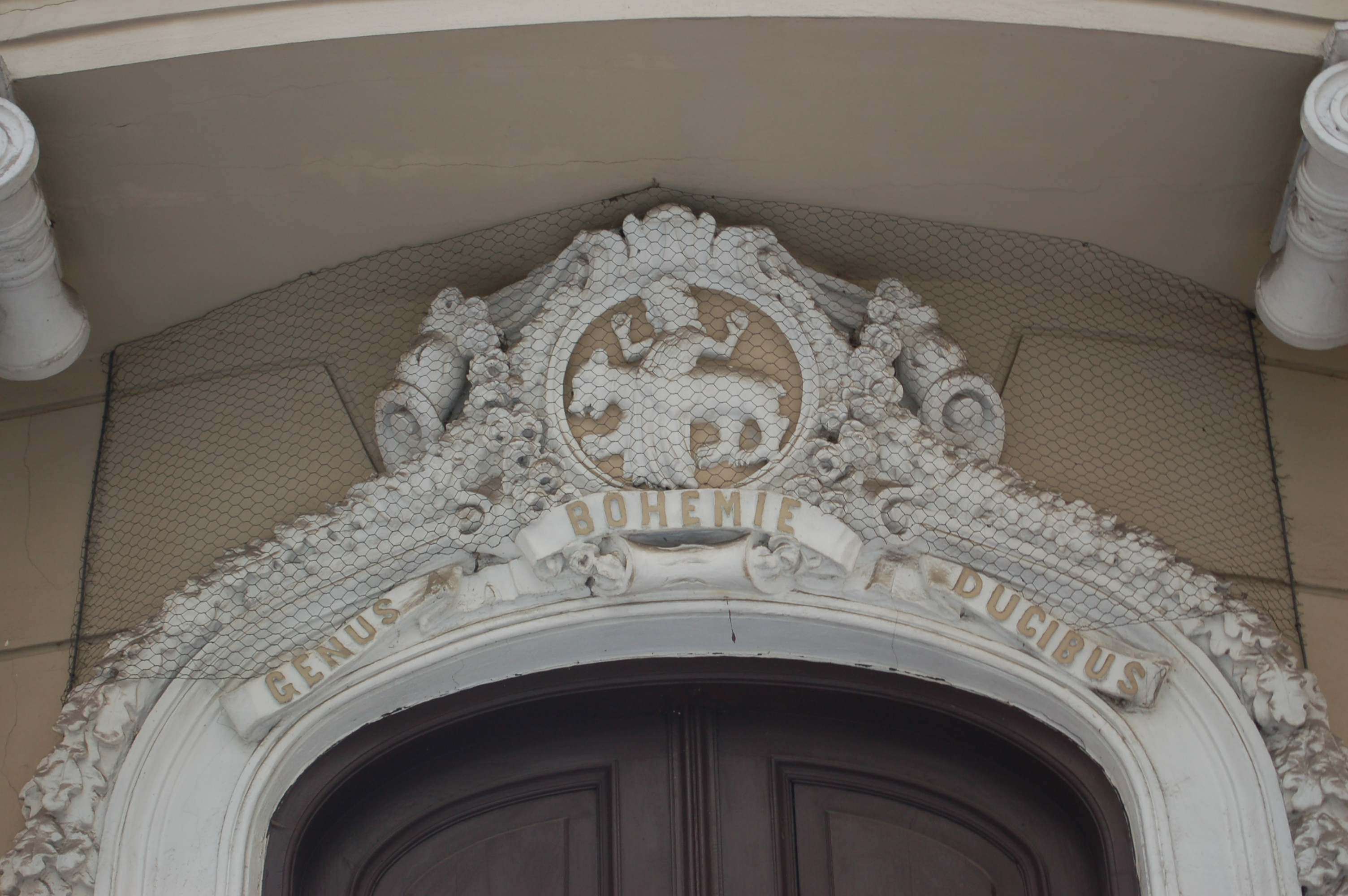 Rusiecki Palace in the backyard Ulica Lwowska 13, Warsaw